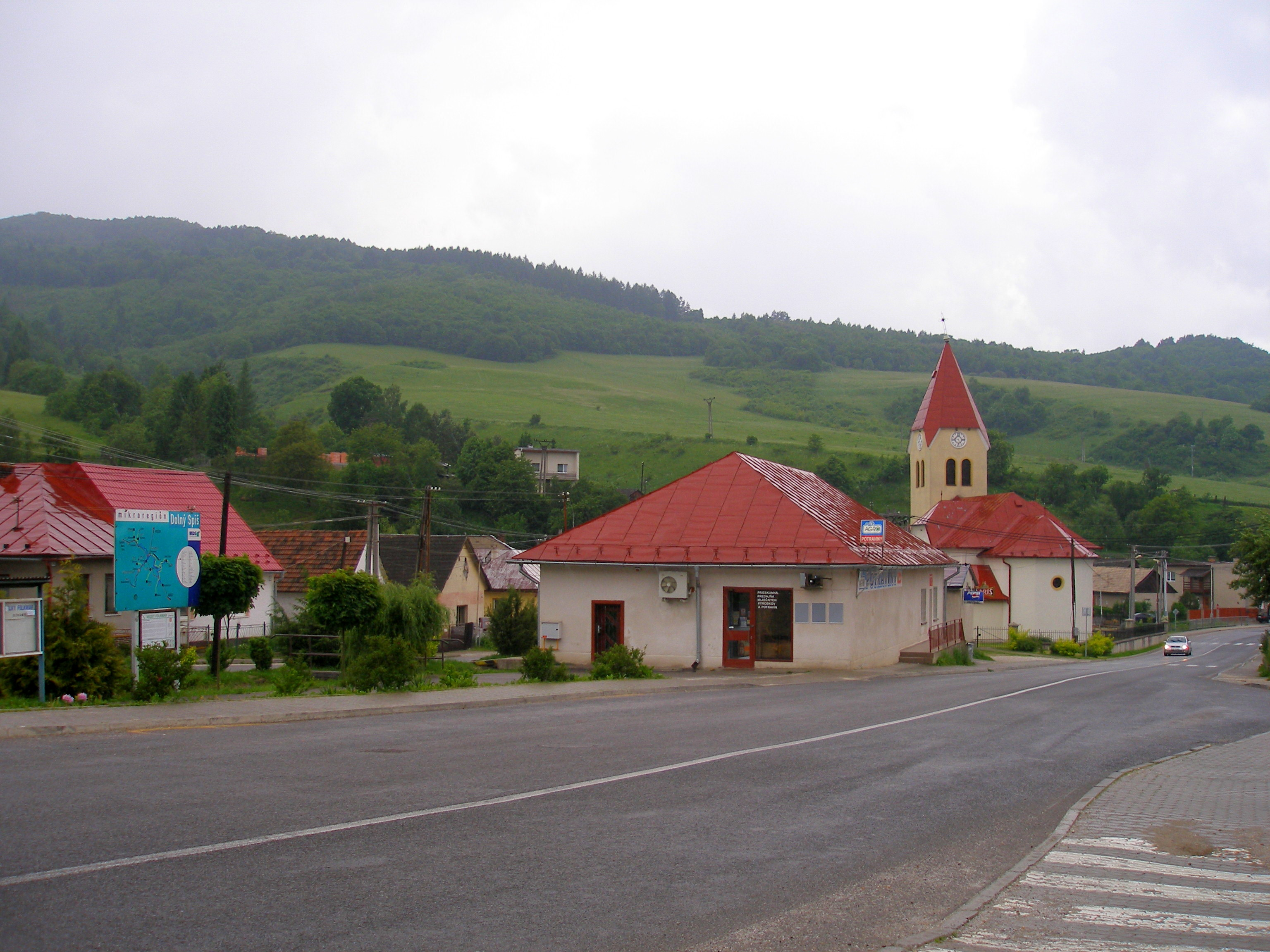 Obec Veľký Folkmar okres Gelnica, región Spiš.